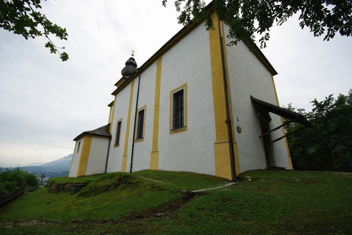 St. Pankraz von Nordwesten